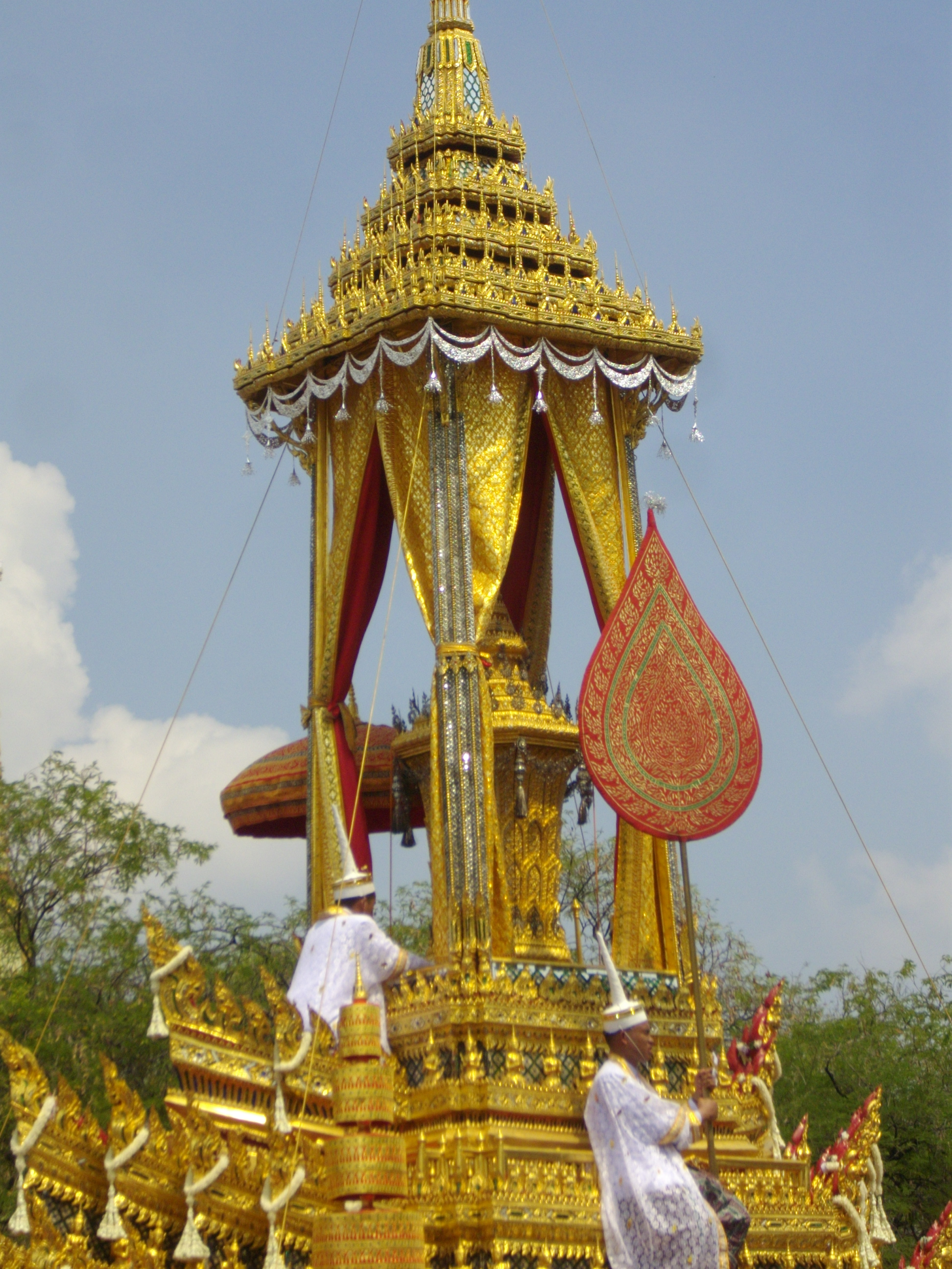 พระโกศทองใหญ่ทรงพระศพสมเด็จพระเจ้าภคินีเธอ เจ้าฟ้าเพชรรัตนราชสุดา สิริโสภาพัณณวดี ประดิษฐานบนพระมหาพิชัยราชรถ มีเจ้าพนักงานภูษามาลาประคอยและเชิญบังสูรย์ถวาย ในริ้วกระบวนพระอิสสริยยศ อัญเชิญพระศพ ด้วยพระมหาพิชัยราชรถ จากหน้าวัดพระเชตุพนวิมลมังคลาราม ไปยังพระเมรุท้องสนามหลวง วันที่ 9 เมษายน พ.ศ. 2555